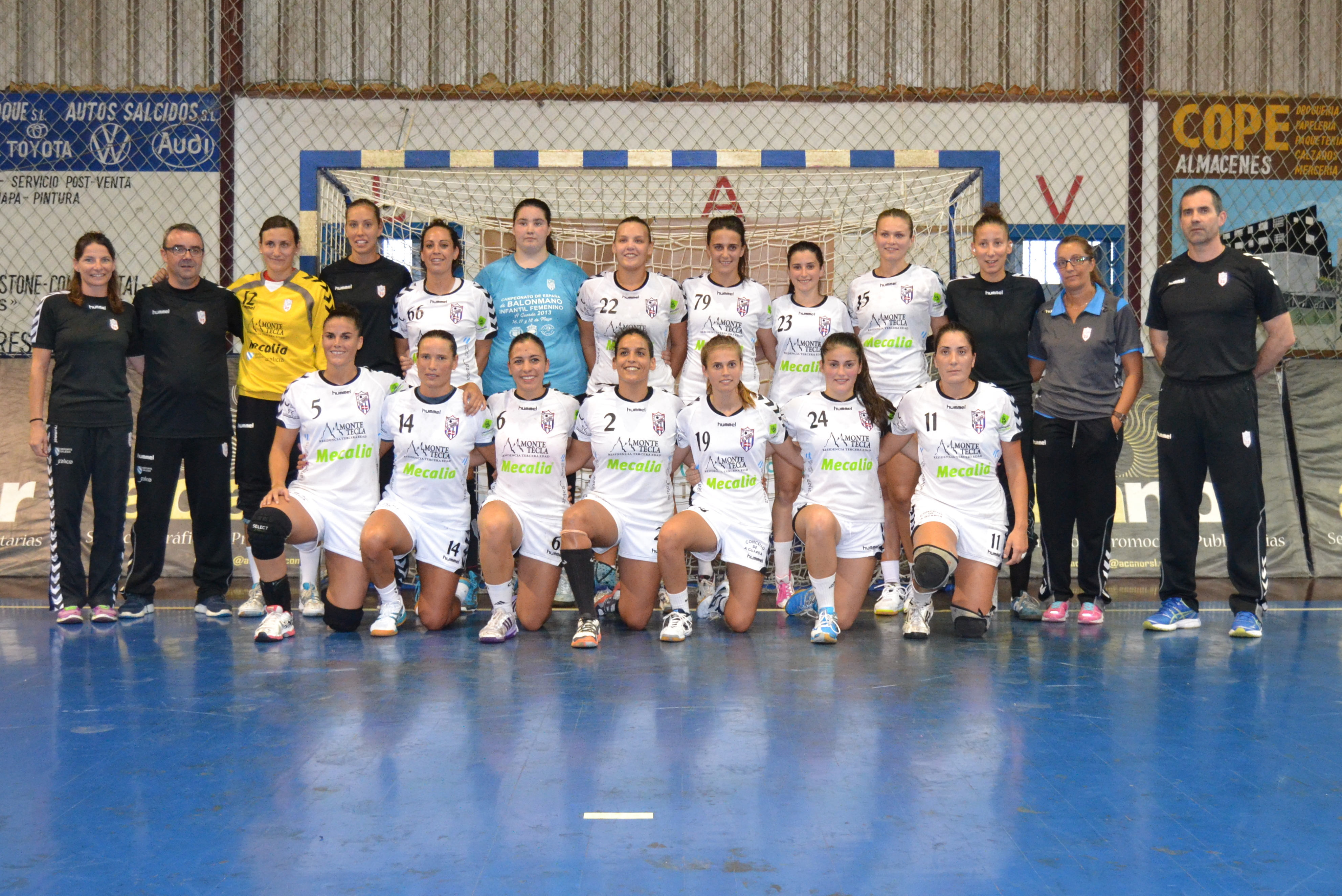 Atlético Guardés no partido homenaxe ás pioneiras do Atlético Guardés